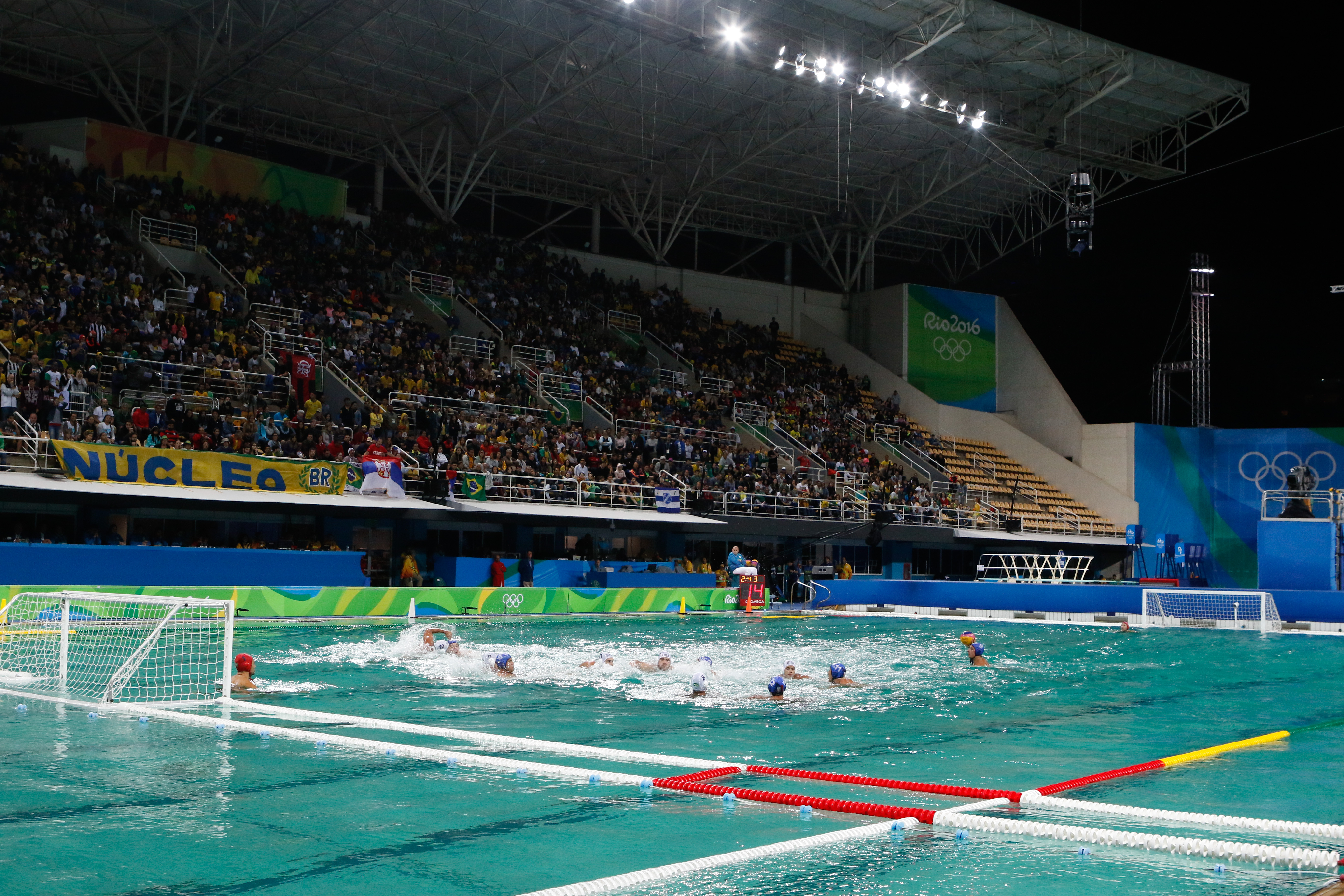 Rio de Janeiro - Seleção masculina brasileira de polo aquático vence a da Sérvia por 6 a 5 nos Jogos Olímpicos Rio 2016, no Parque Aquático Maria Lenk (Fernando Frazão/Agência Brasil)